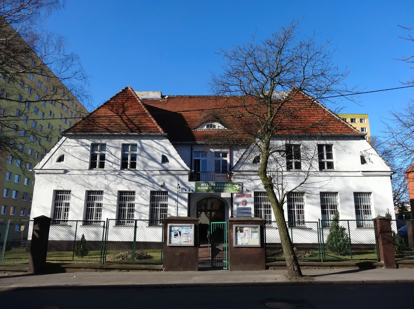 Budynek dawnej szkoły ludowej przy ul. Karpackiej na osiedlu Wzgórze Wolności w Bydgoszczy